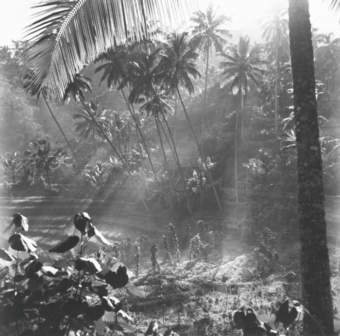 negatief. Landschap in de omgeving van Iseh